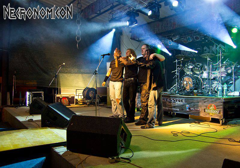 Bandfoto von Necronomicon nach dem Auftritt in Pohori (Tschechien)